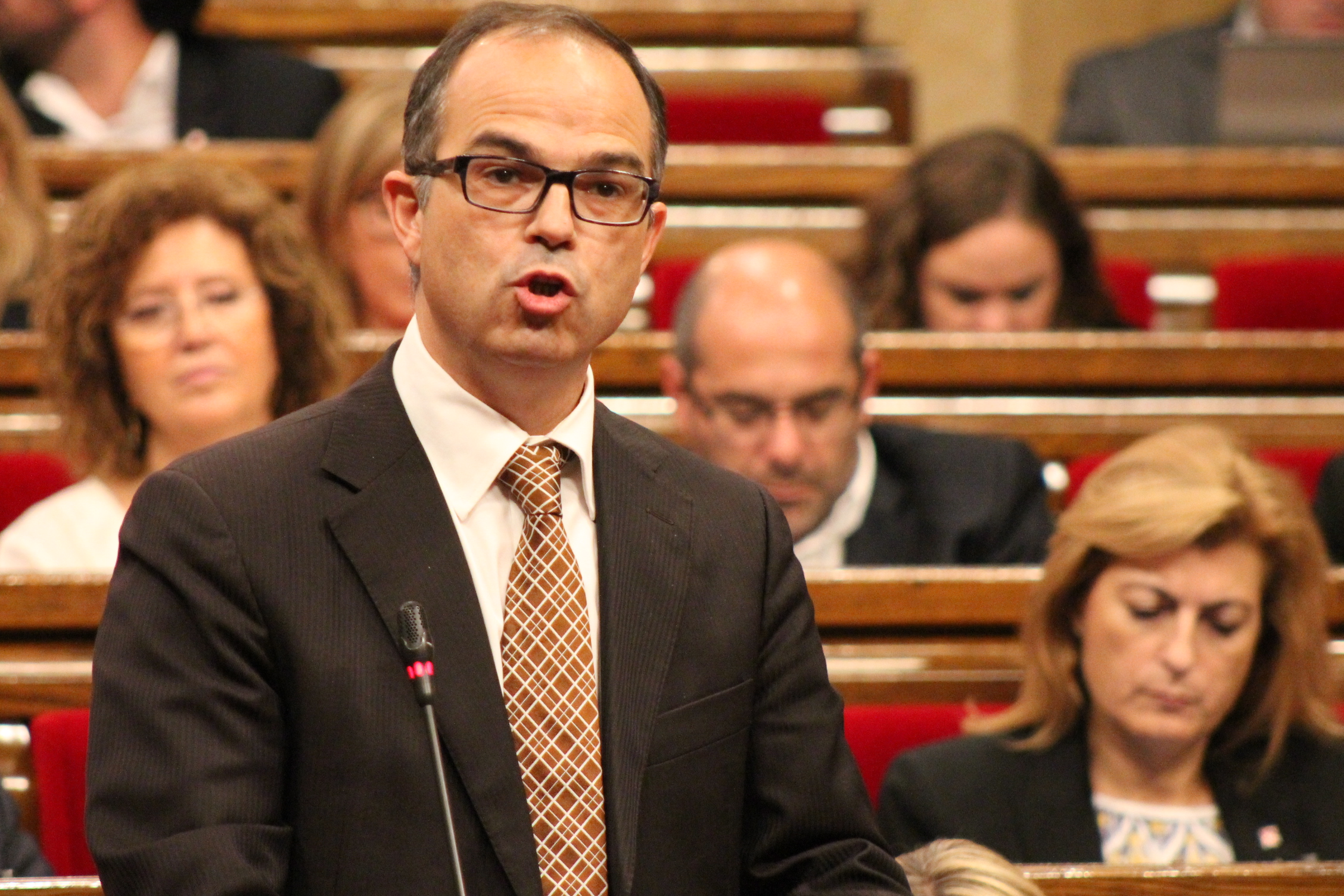 Jordi Turull a la sessió de control del Ple del Parlament